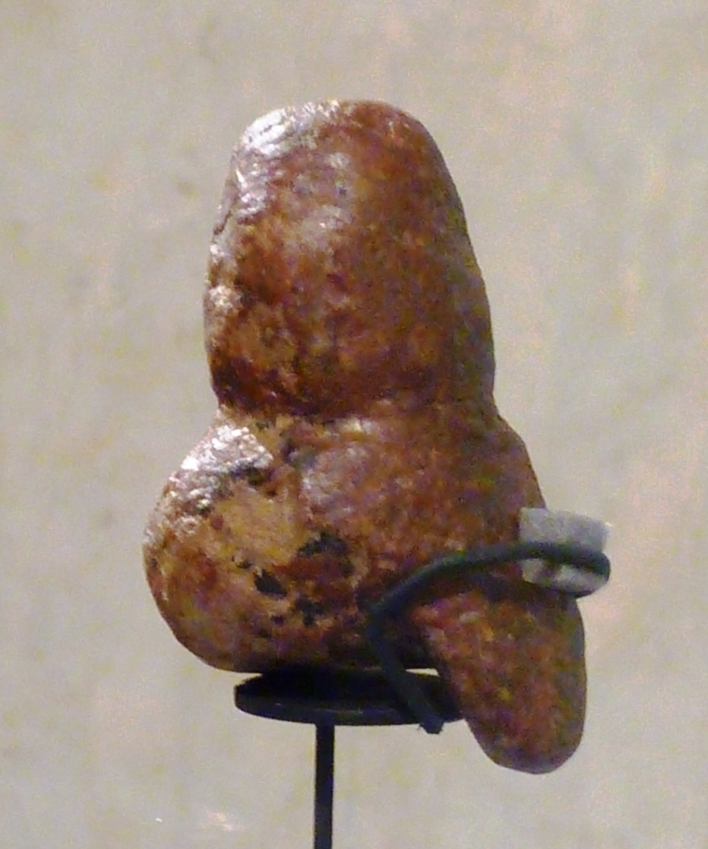 Die Venus von Mauern, eine steinzeitliche Figur, fotografiert in einer Ausstellung in Trento.